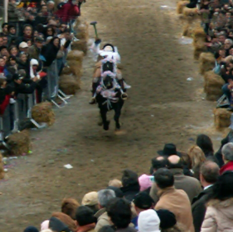 Oristano, Sartiglia, Su Componidori, remada